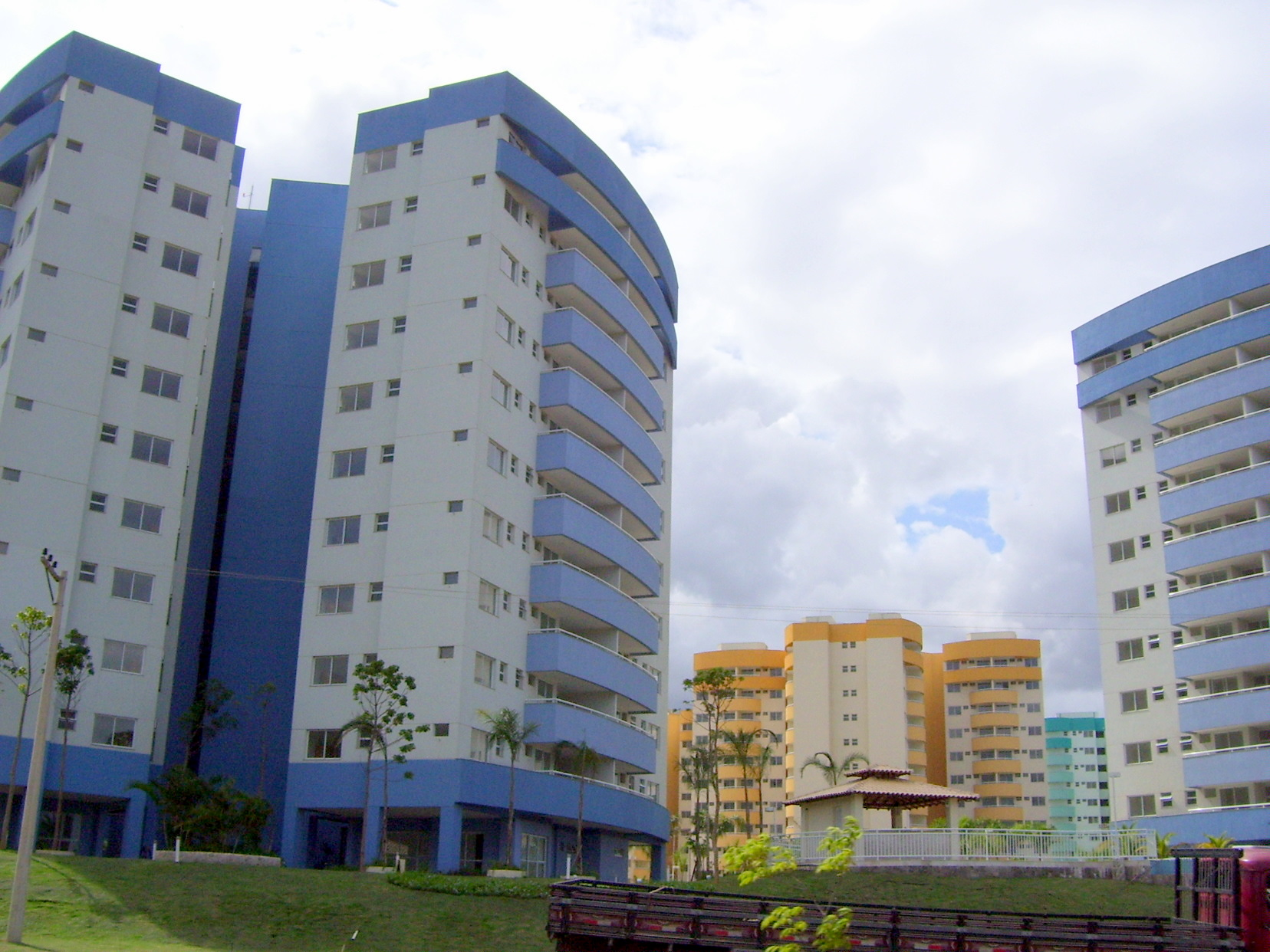 Vila Panamericana - Rio 2007 (Panamerican Village - Rio 2007)